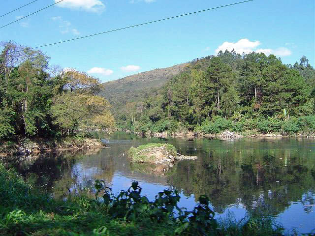 Rio Tietê próximo a Pirapora/SP (Tietê River, near Pirapora do Bom Jesus), São Paulo, Brazil.